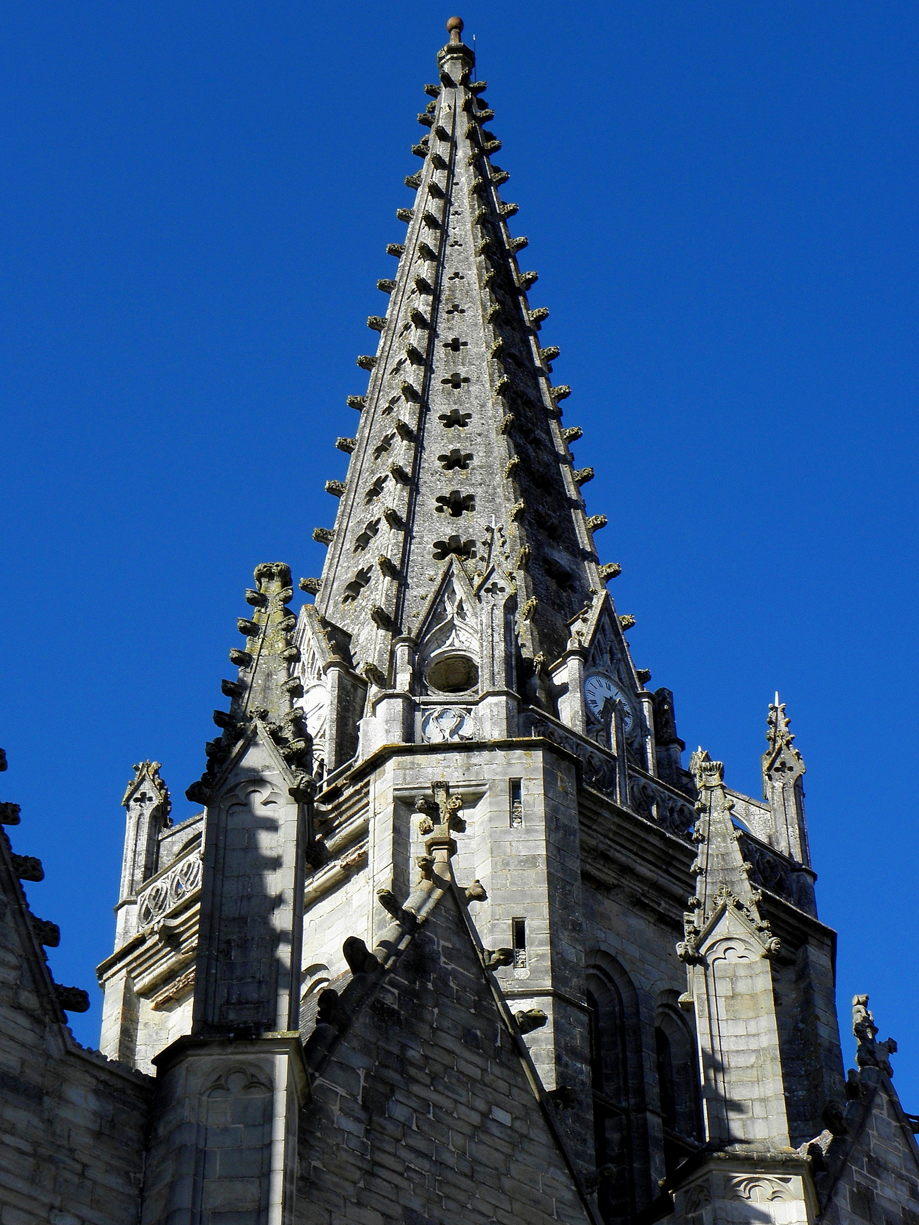 Façade sud de l'église Notre-Dame de Vitré (35). Vue de la flèche de la tour-clocher.